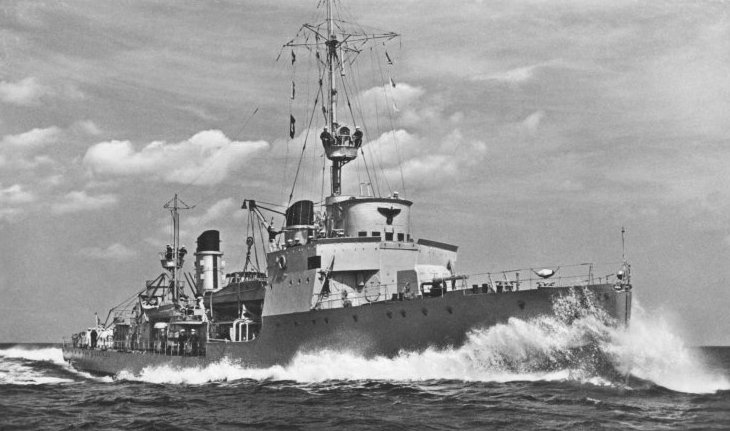 Der Flottenbegleiter F 1